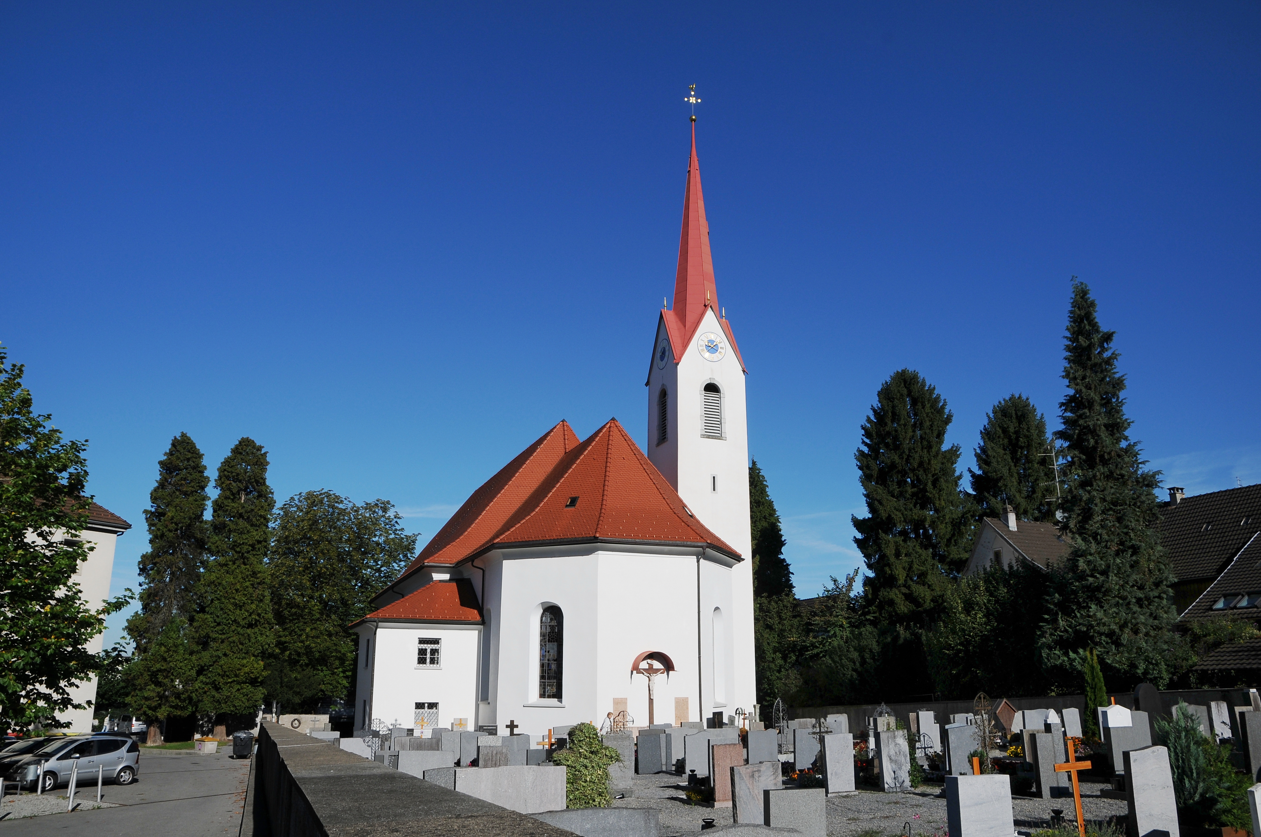 Kath. Pfarrkirche Zu Unserer Lieben Frau Mariä Heimsuchung im Stadtbezirk Haselstauden von Dornbirn.